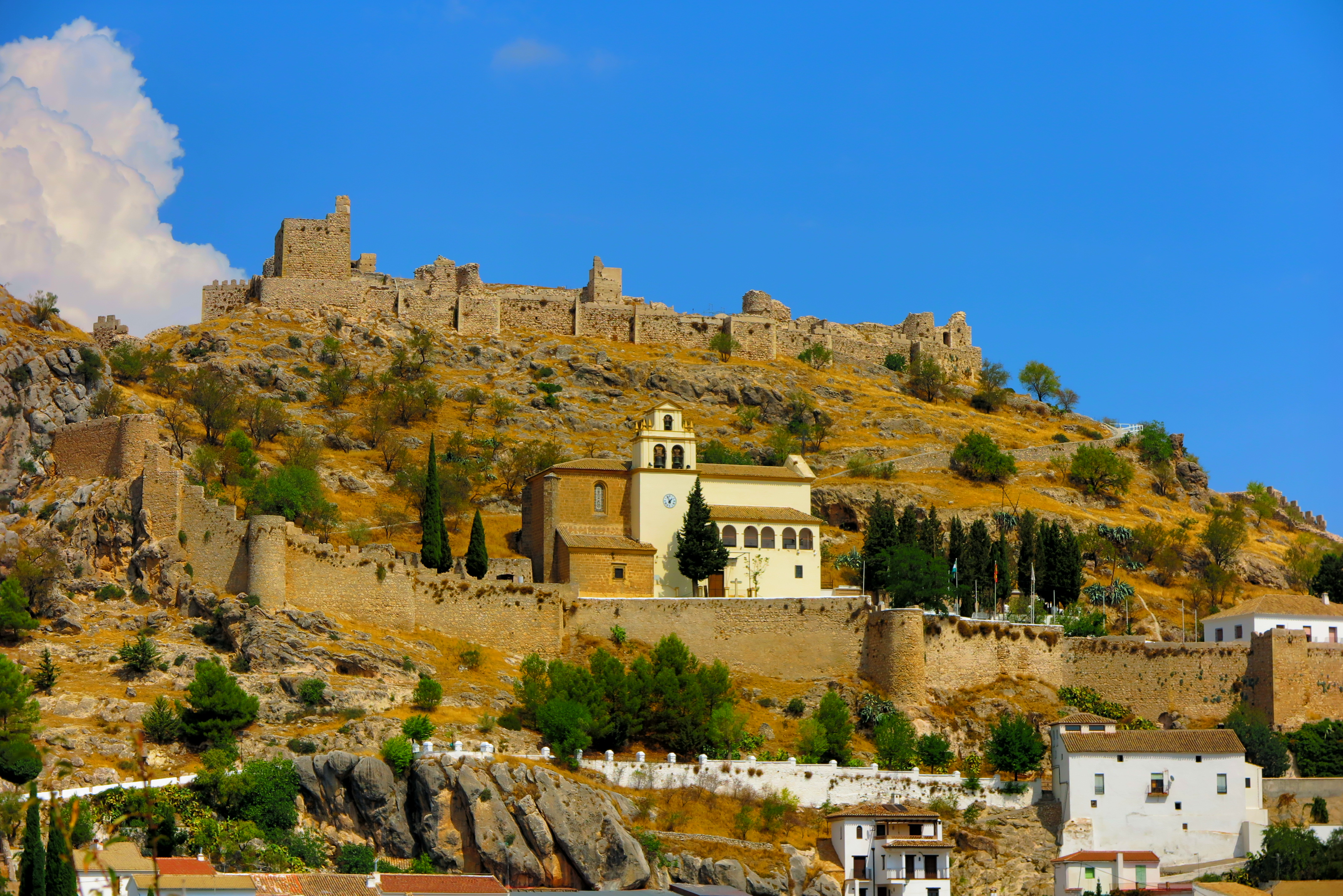 Muralla de Moclín